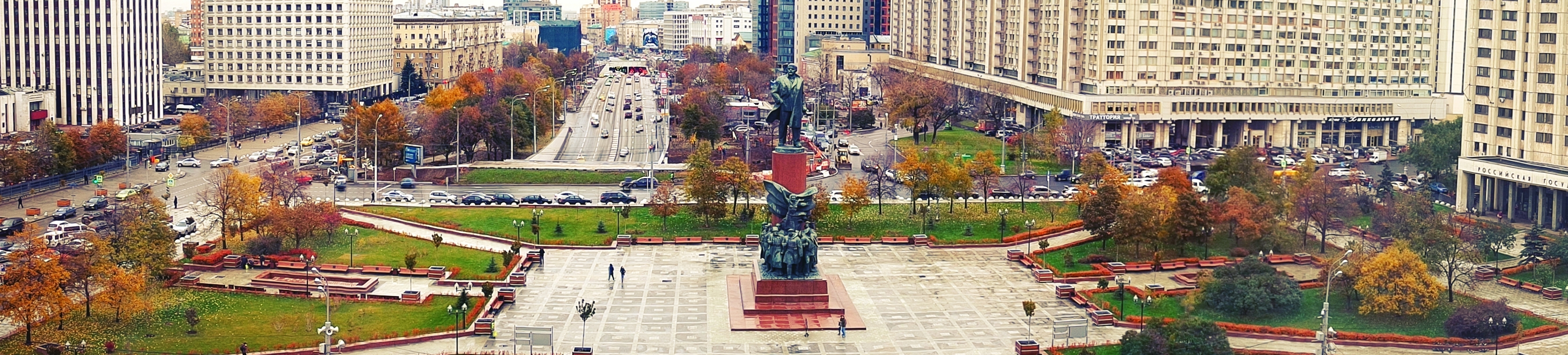 Калужская площадь в Москве, панорамный вид